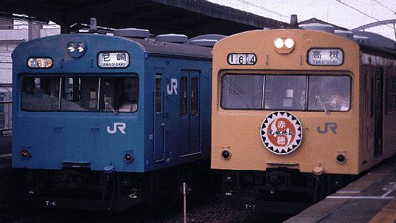 黄5号から青22号への塗り替えが進められていた頃の福知山線103系電車